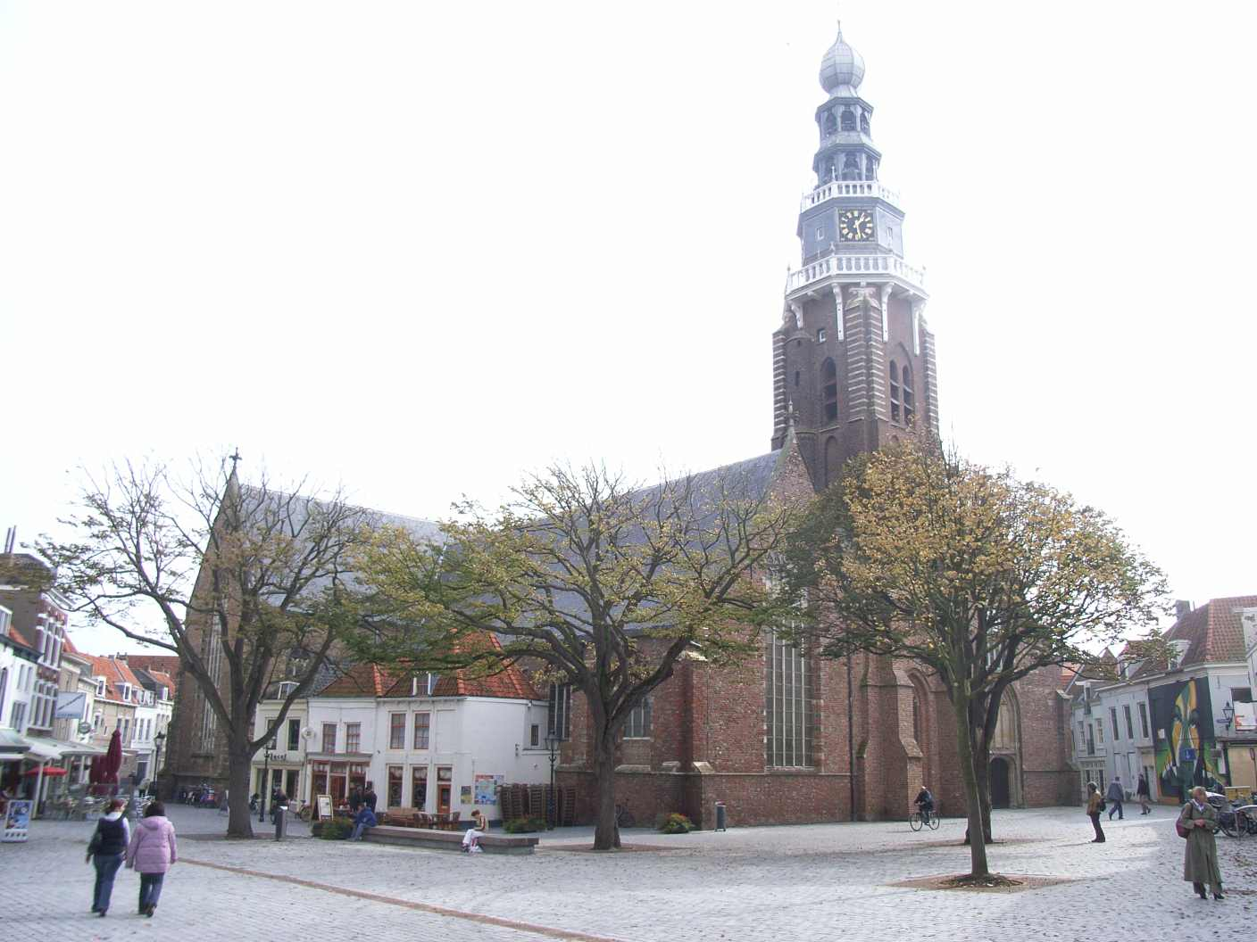 Church Sint Jacob, Vlissingen, NL